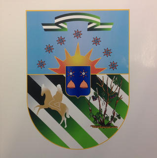 Герб города ГАл